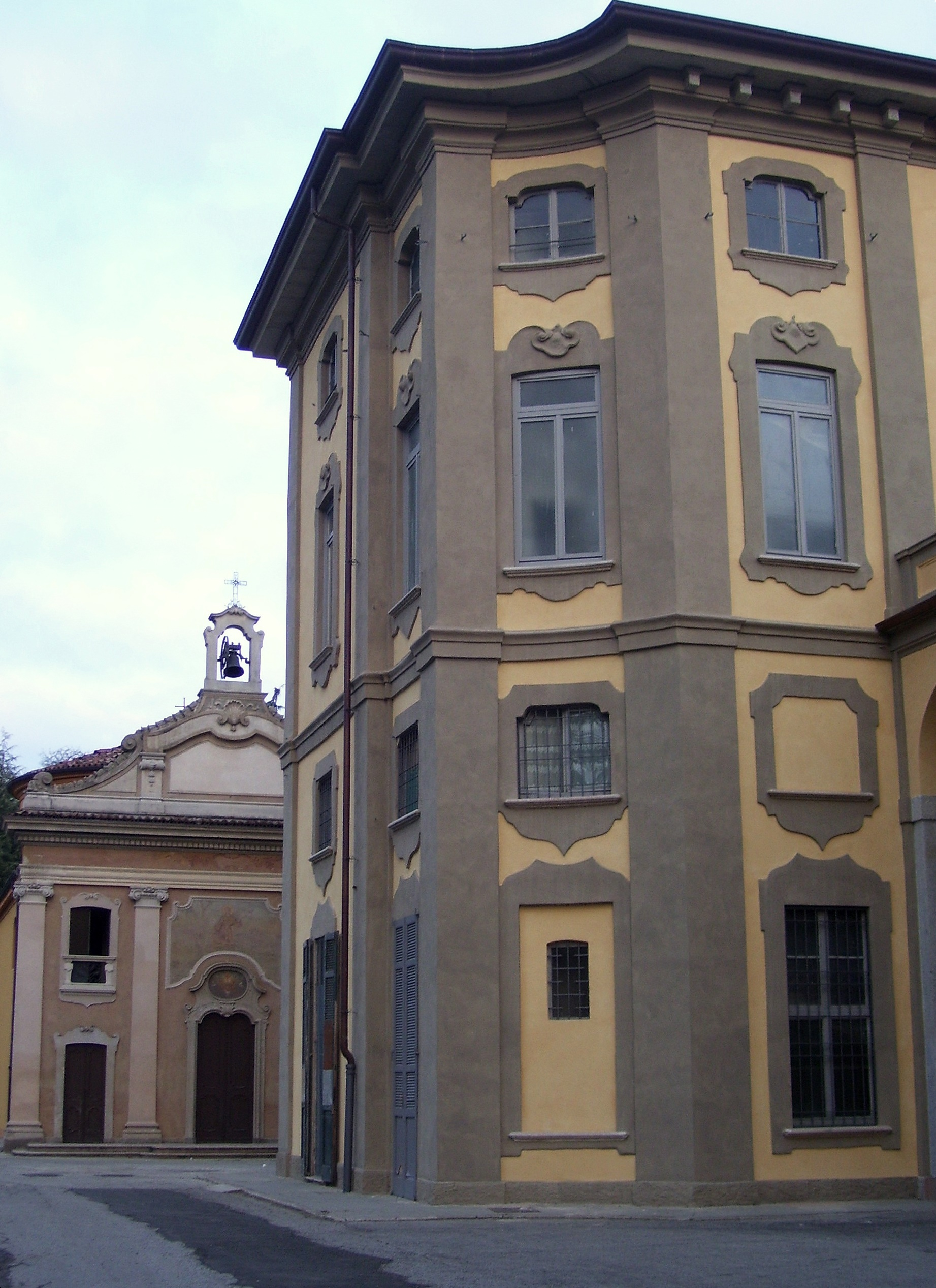 La settecentesca Villa Pusterla (Limbiate) con la facciata della chiesetta di San Fracnesco.